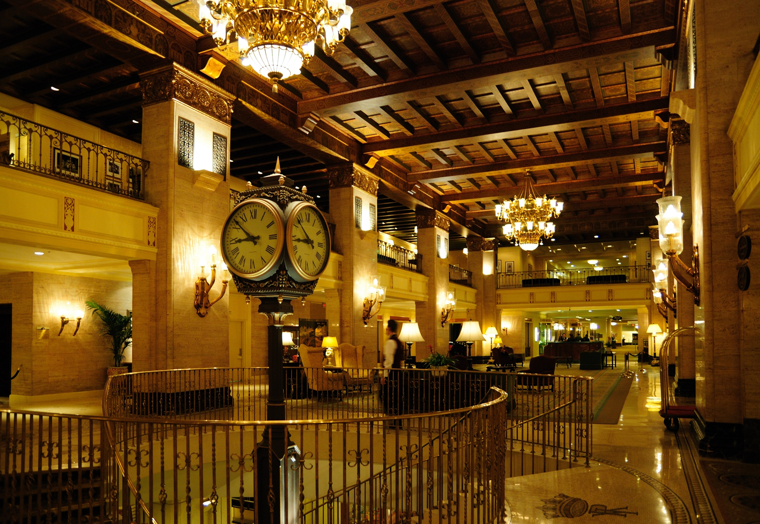 Empfangsbereich im ersten Stock des Fairmont Royal York Hotels